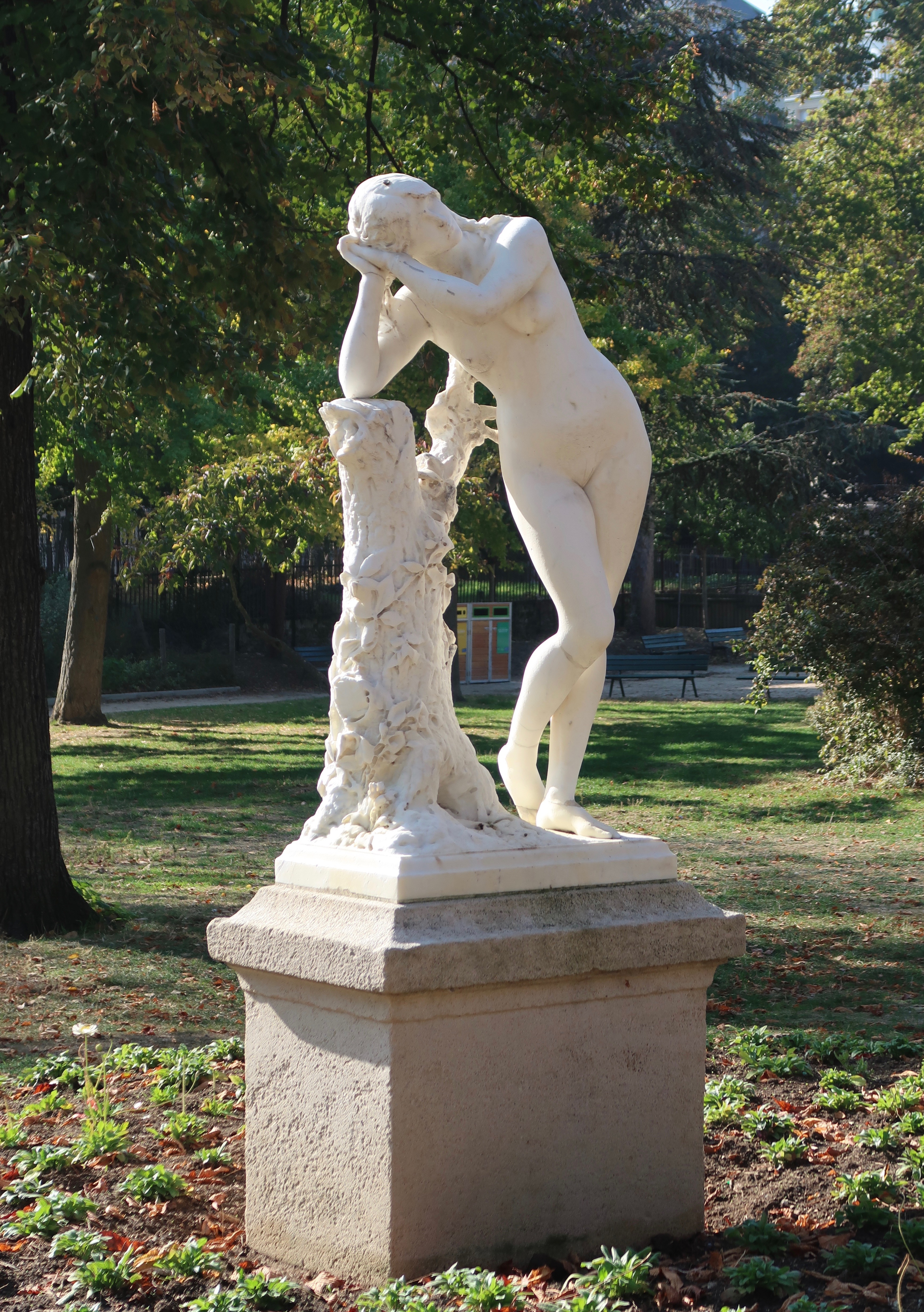 Méditation, statue de Tony Noël, jardin du Ranelagh (Paris, 16e).